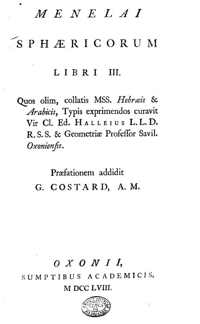 Menelai Sphaericorum libri 3. Quos olim, collatis mss. Hebraeis & Arabicis, typis exprimendos curavit vir Cl.Ed. Halleius ... Praefationem addidit G. Costard. - Oxonii : sumptibus Academicis, 1758. - [2], VIII, 112 p. : ill. ; 8º .